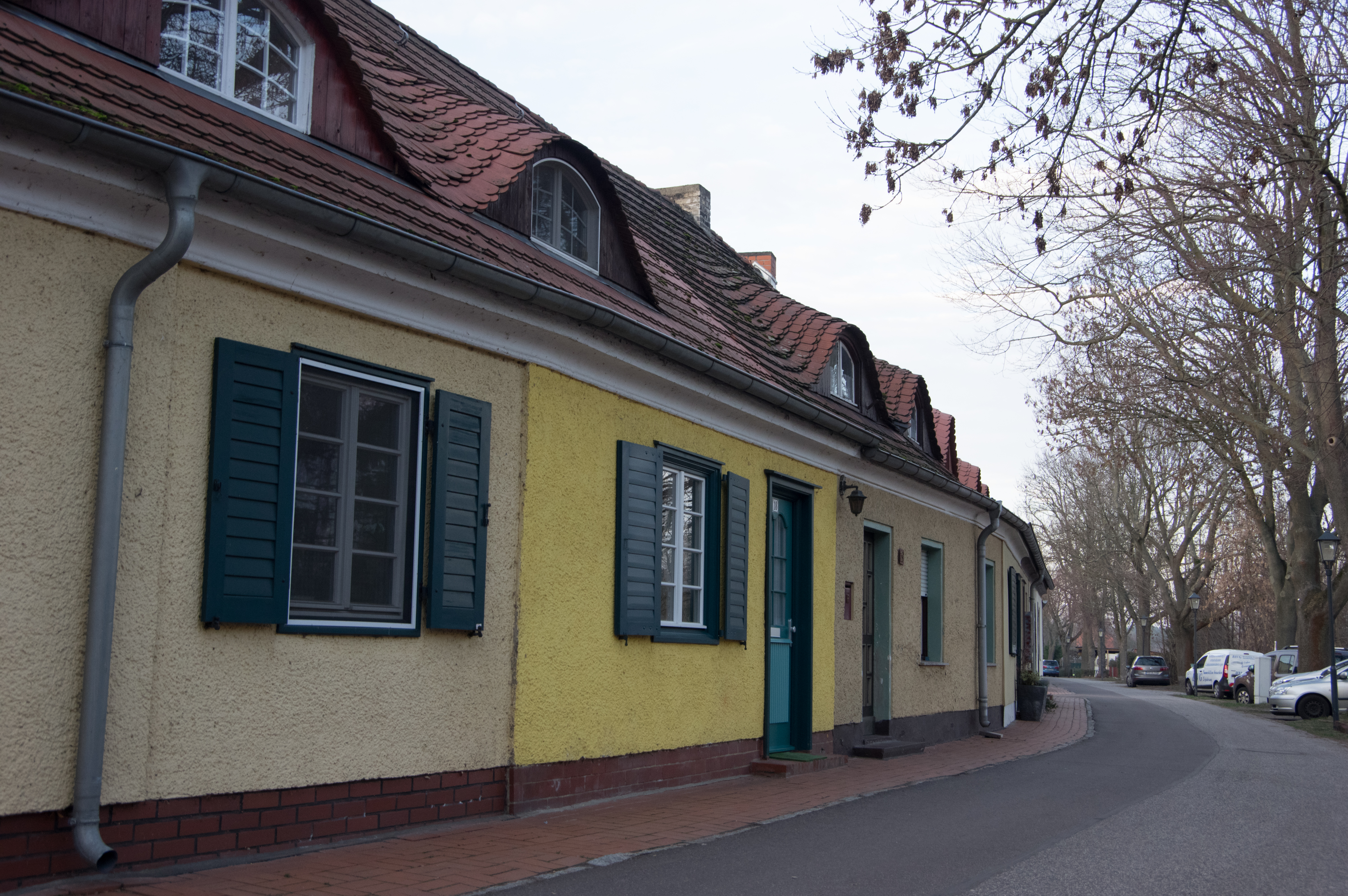 Brandenburg an der Havel, Ortsteil Plaue. Die Gartenstadt steht unter Denkmalschutz.